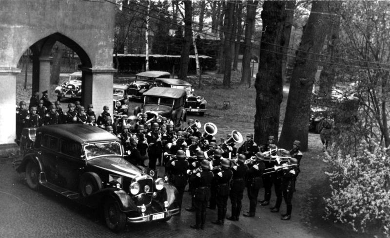 Vor Rathaus Bremen Standmusik d. Sch. P. Bremen